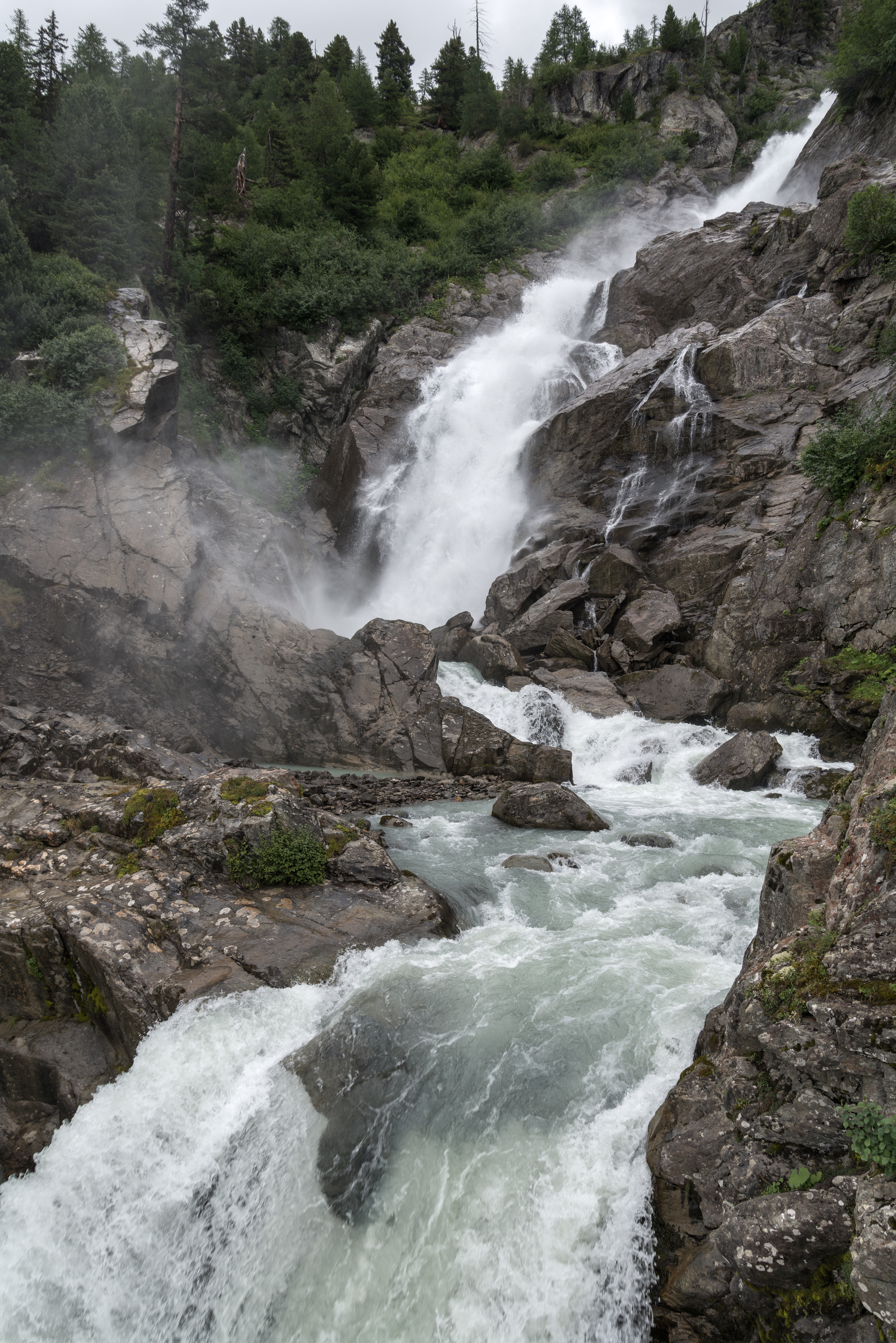 Cascate del Rutor - La Thuile, Aosta, Italia